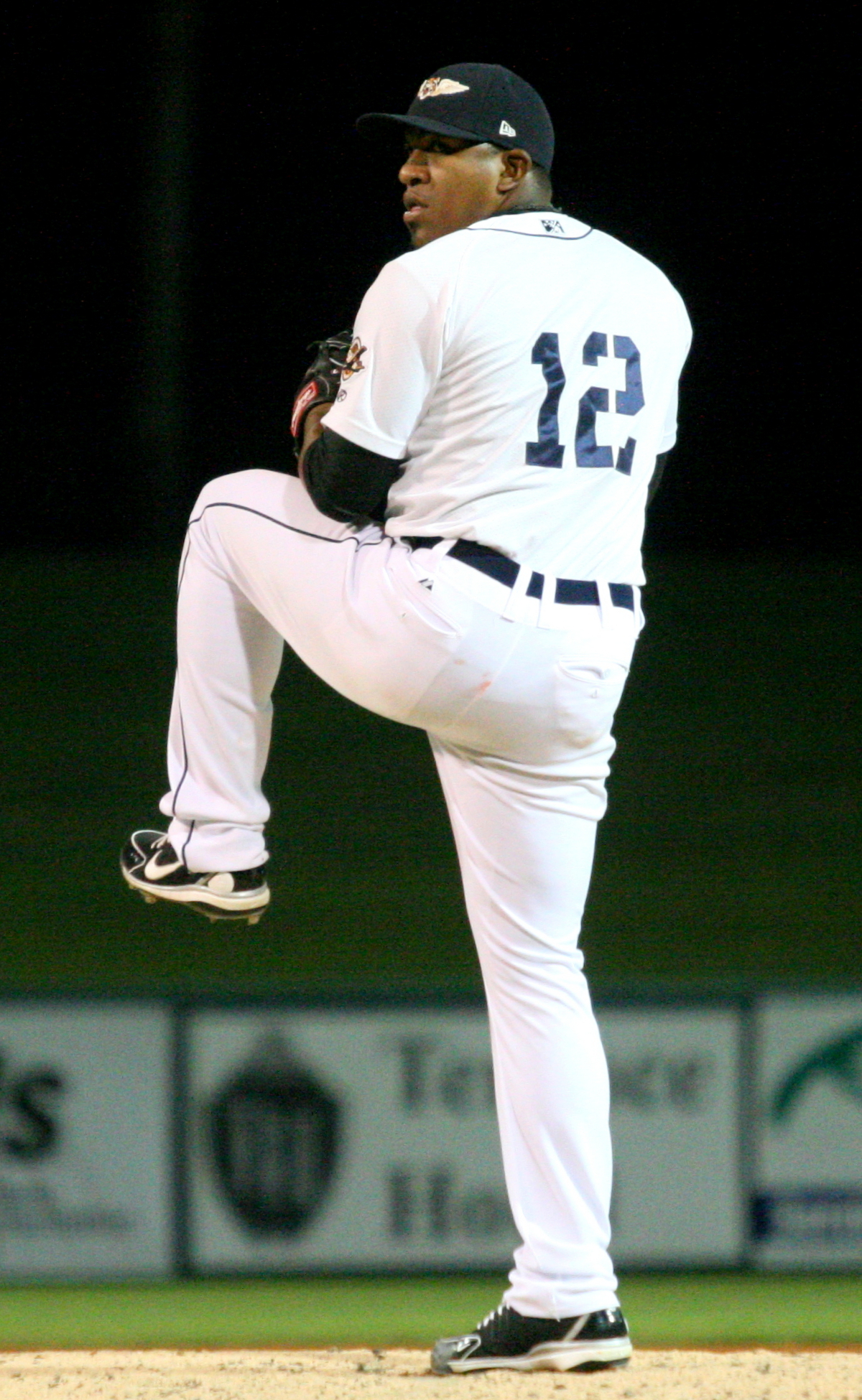 Ángel Nesbitt